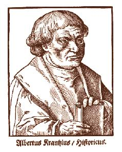 Albert Krantz, hansischer Gelehrte, Historiker, Syndikus und Diplomat